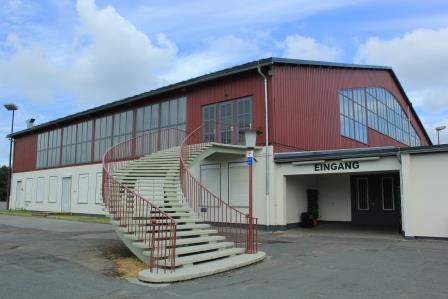 Die Halle Gartlage (Eingangsbereich) 2015.